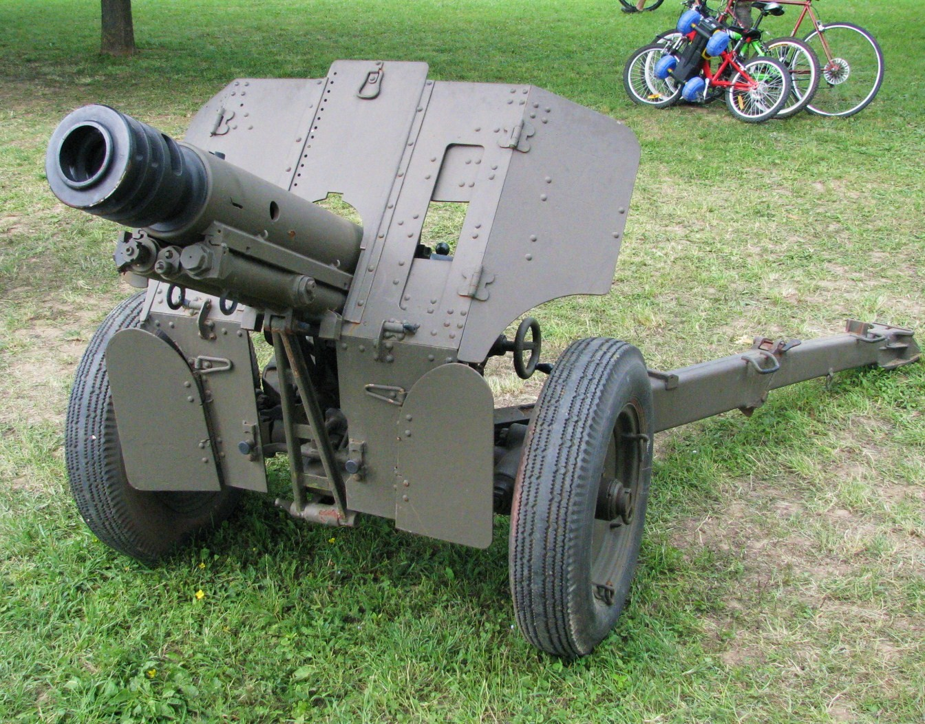 Brdski top 76,2mm M-48B1